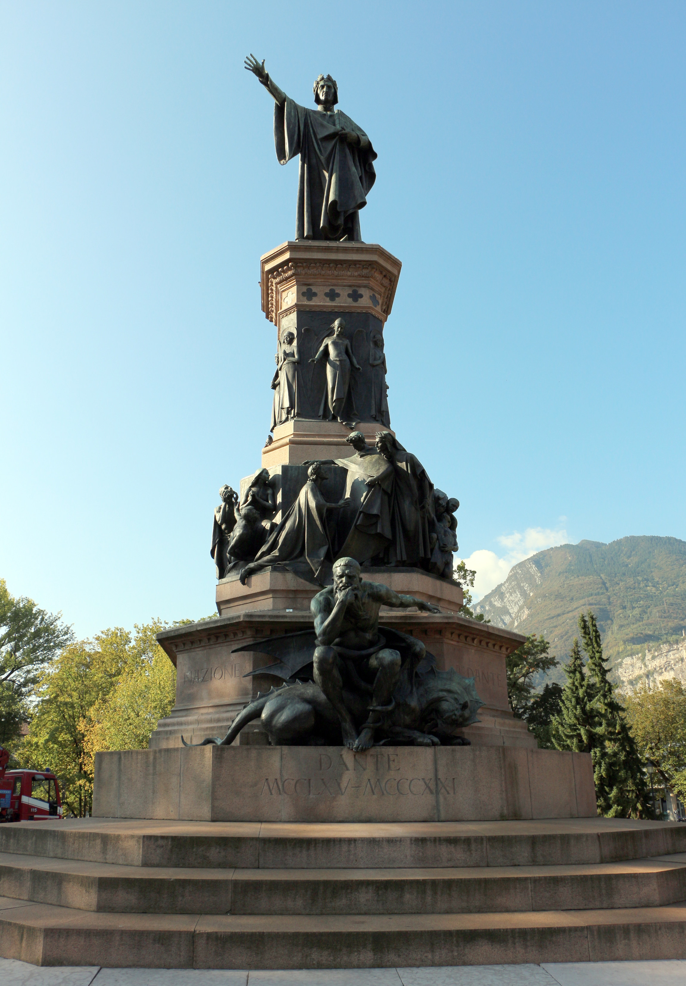 Monumento a Dante Alighieri This is a photo of a monument which is part of cultural heritage of Italy.